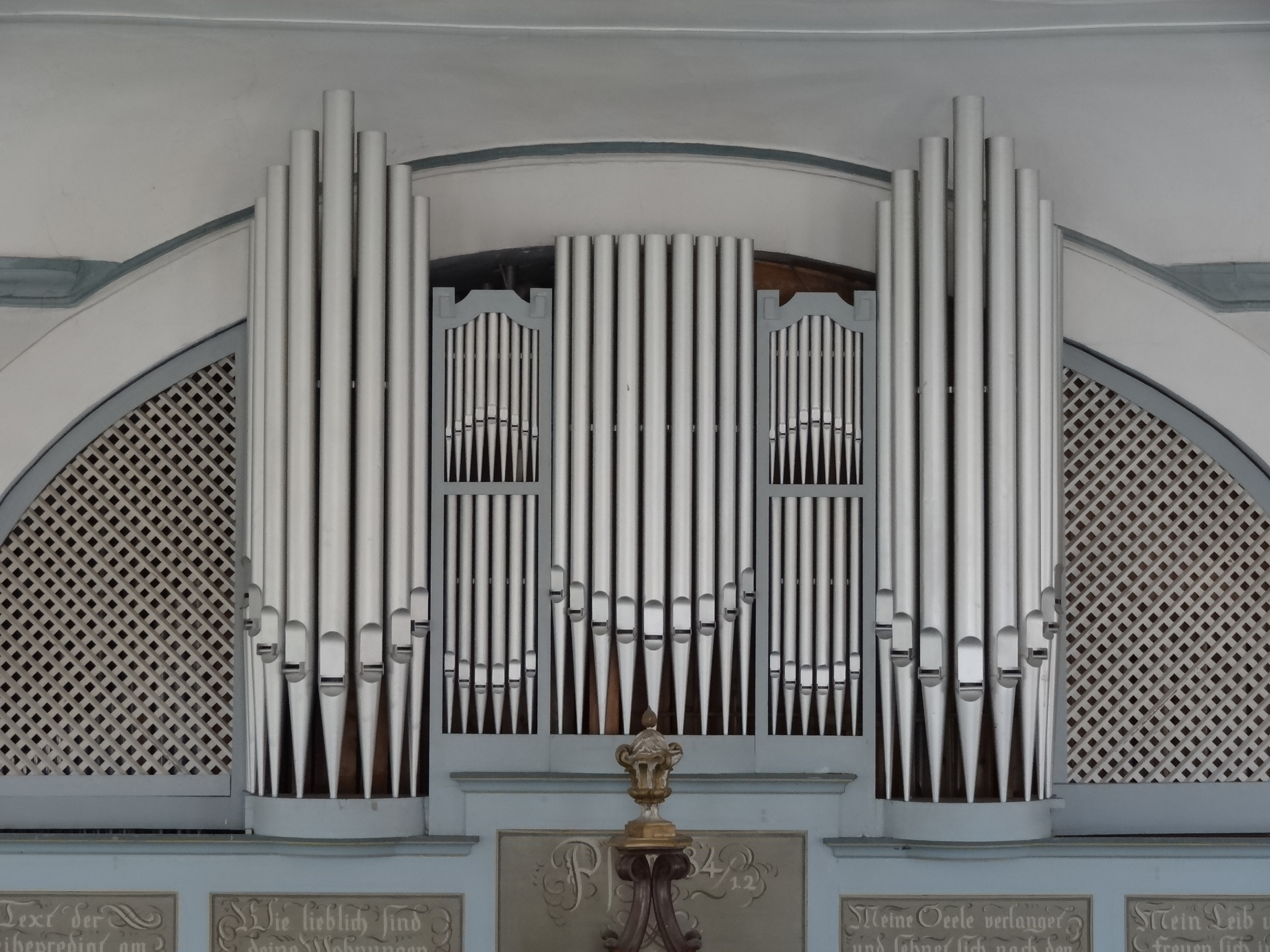 Evangelische Kirche Langsdorf (Lich)